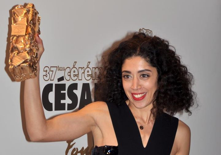 Naidra Ayadi à la cérémonie des César